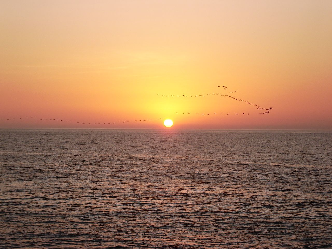 Foto tirada por mim, em Arica.